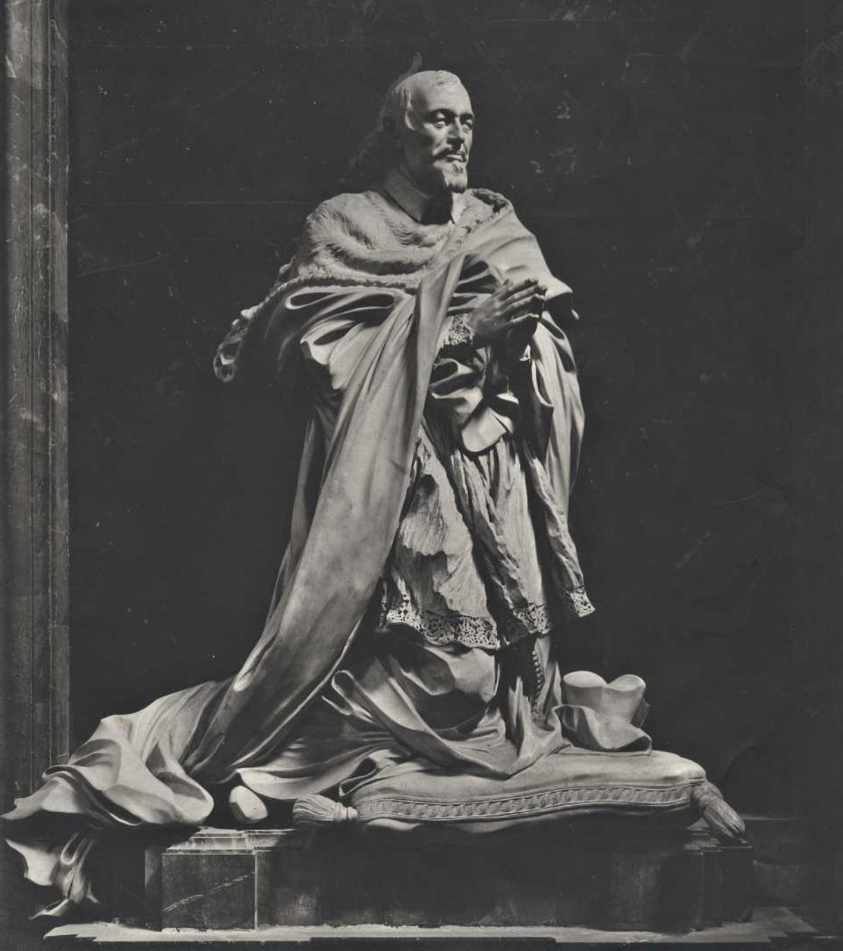 Ercole Antonio Raggi: Statue des Kardinals Marzio Ginetti in der Cappella Ginetti, Sant'Andrea della Valle, Rom, 1670-1675; Foto vor 1919